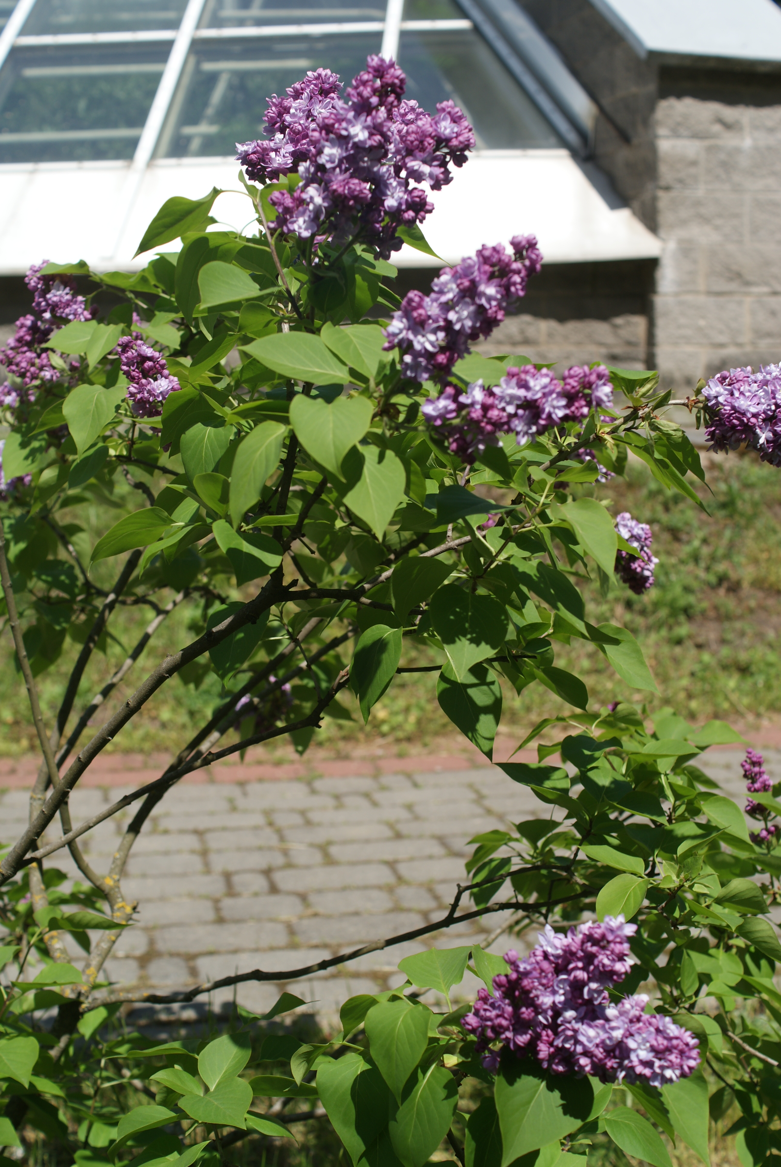 Syringa 'Gaizinkalns'